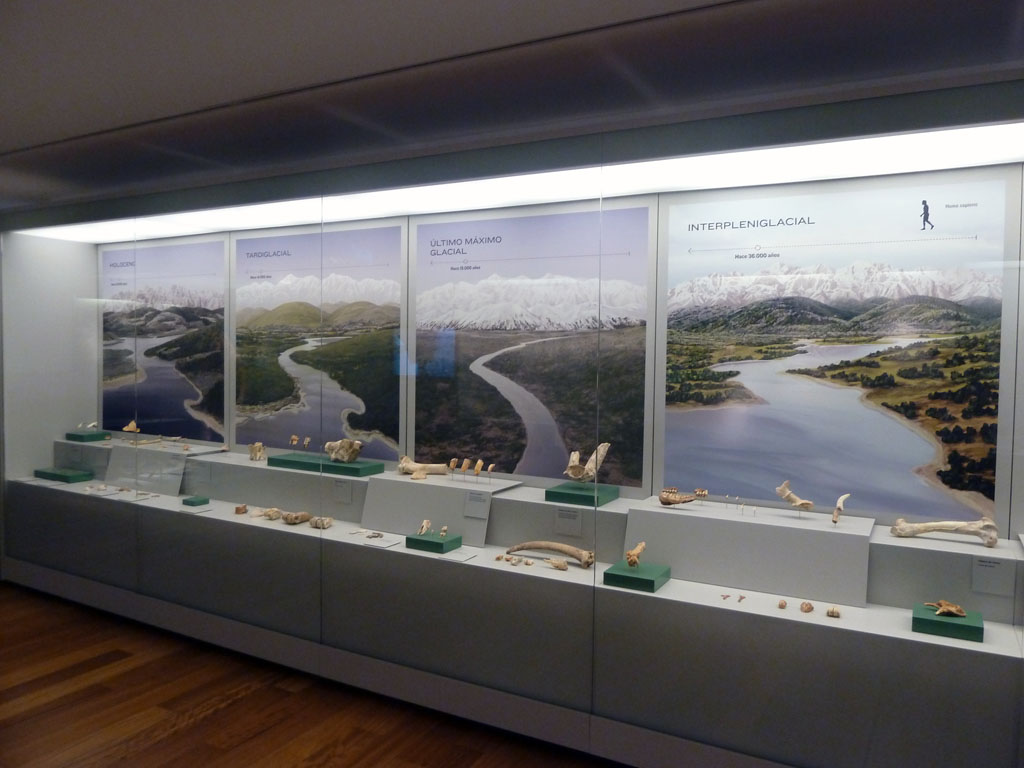 Oviedo